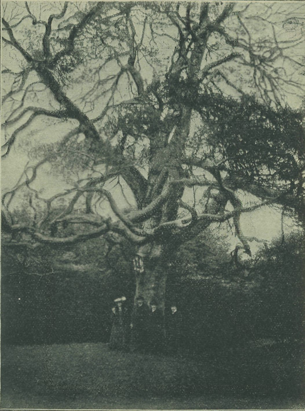 Bratrská borovice u Jedliny v Habřině kolem roku 1900, historický snímek Jan Vilím